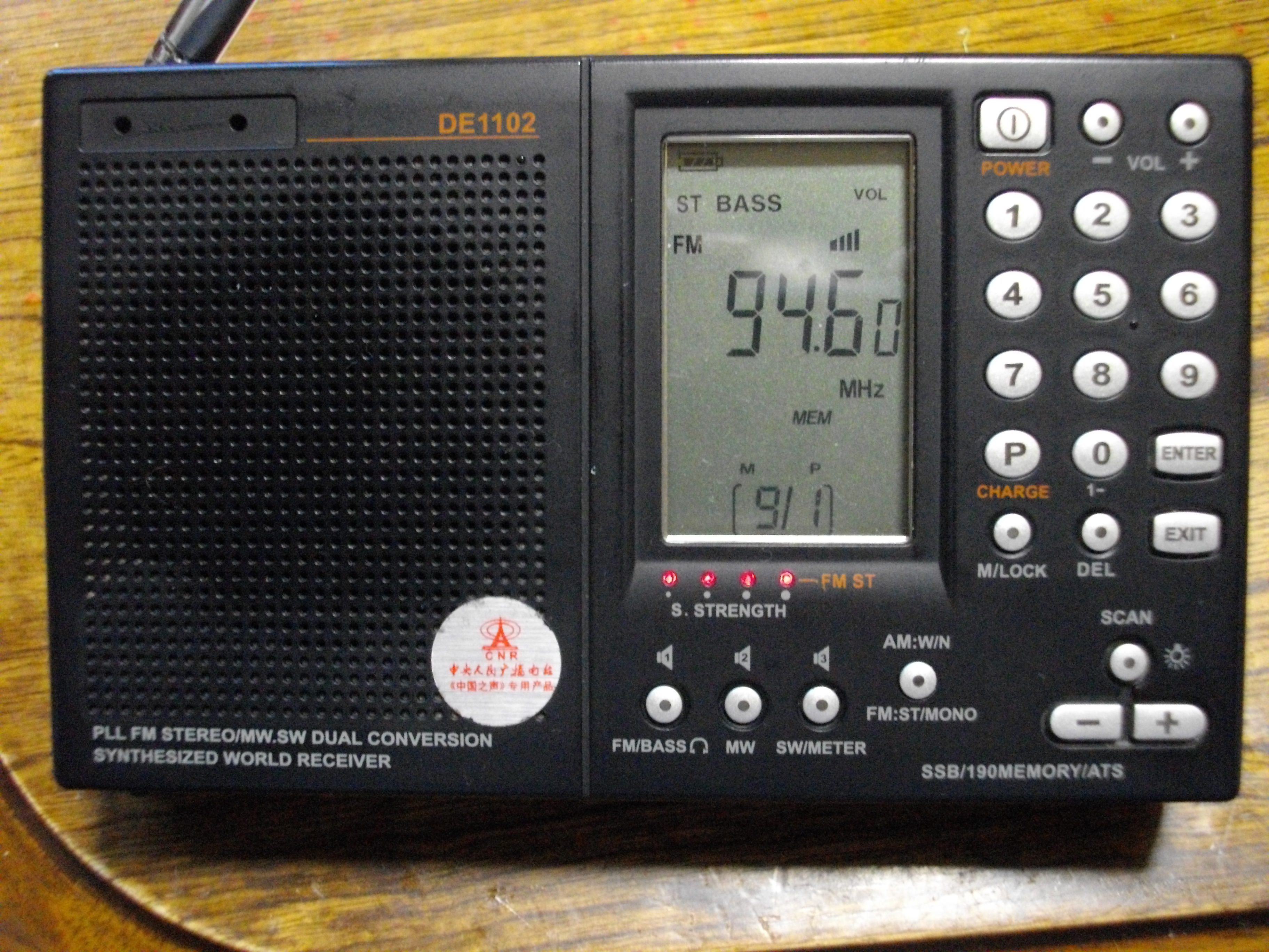 IBS茨城放送（JOYF）のFM補完波94.6MHzを茨城県南部で受信中の状態（2015年9月20日）